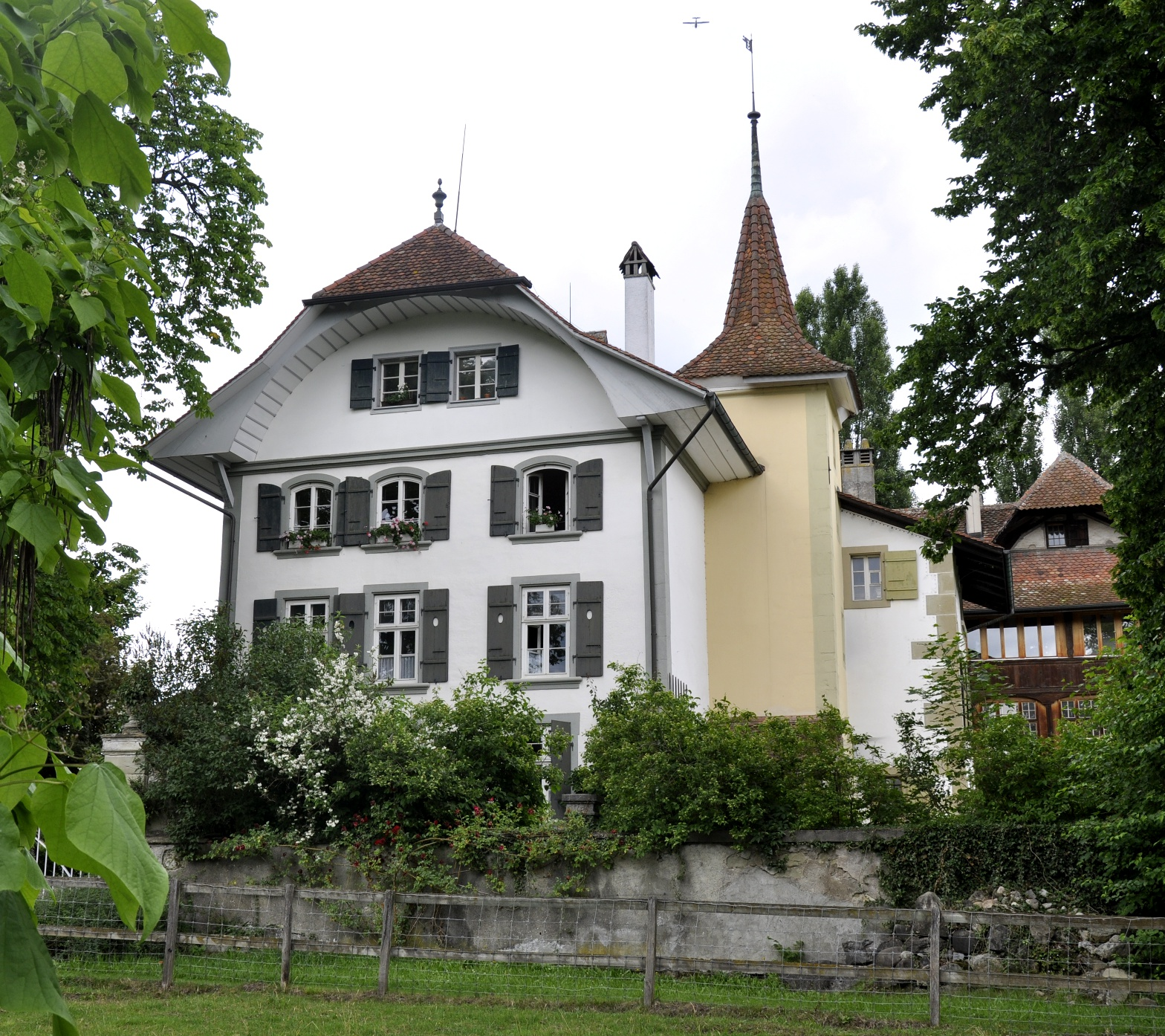 Schloss Wittigkofen, Bern, Schweiz